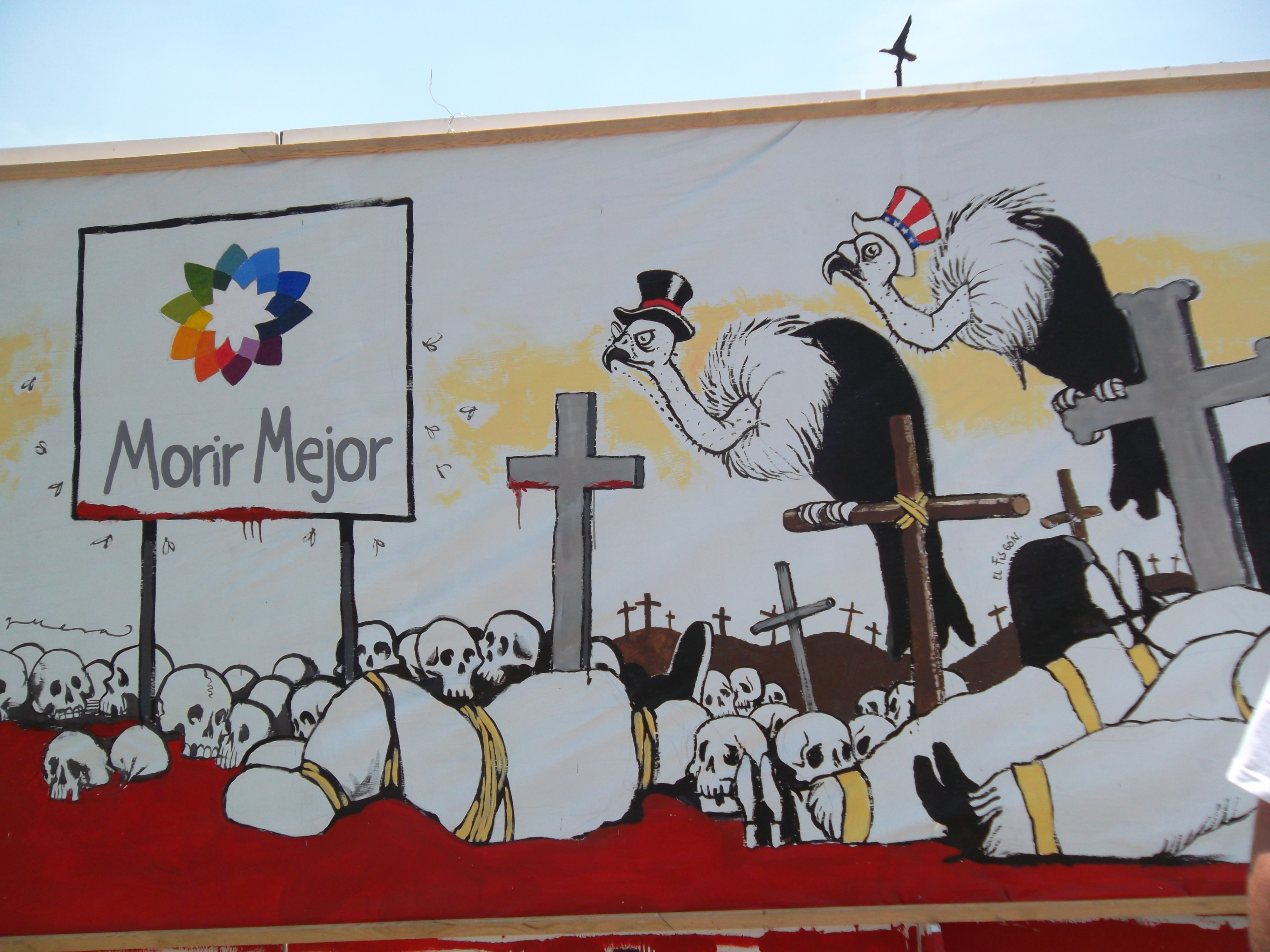 Mural elaborado para la marcha por la paz, el 8 de mayo de 2011 en la Ciudad de México.